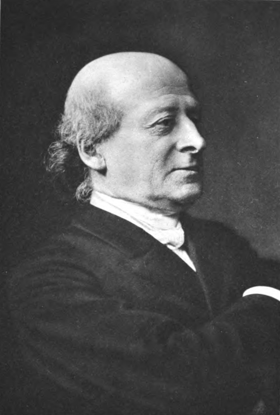 Rudolf Haym. In: Aus meinem Leben: Erinnerungen. Berlin: R. Gaertner (H. Heyfelder), 1902